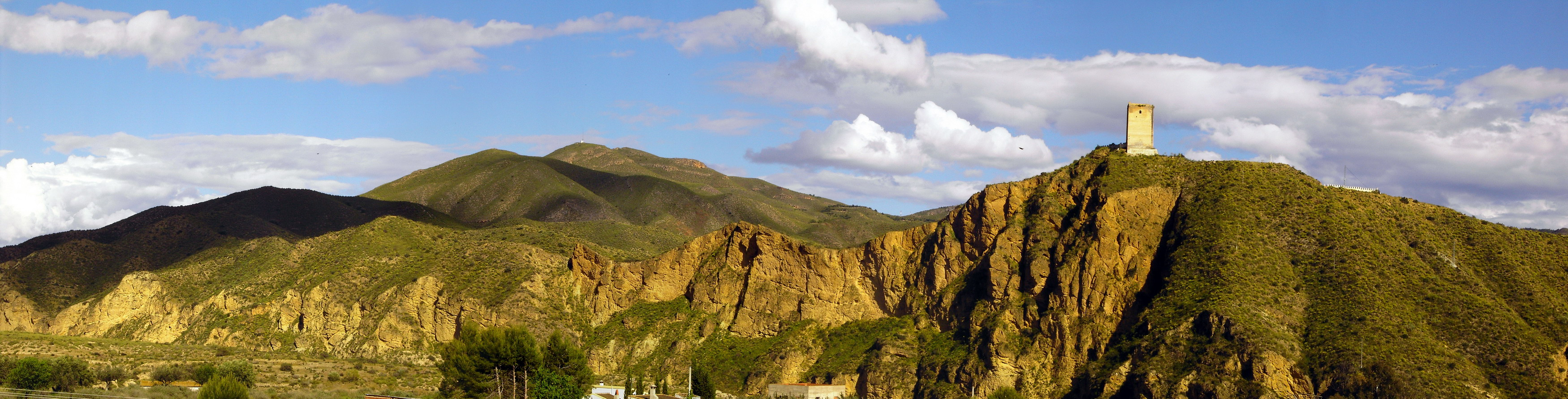 Panorámica de Huércal-Overa